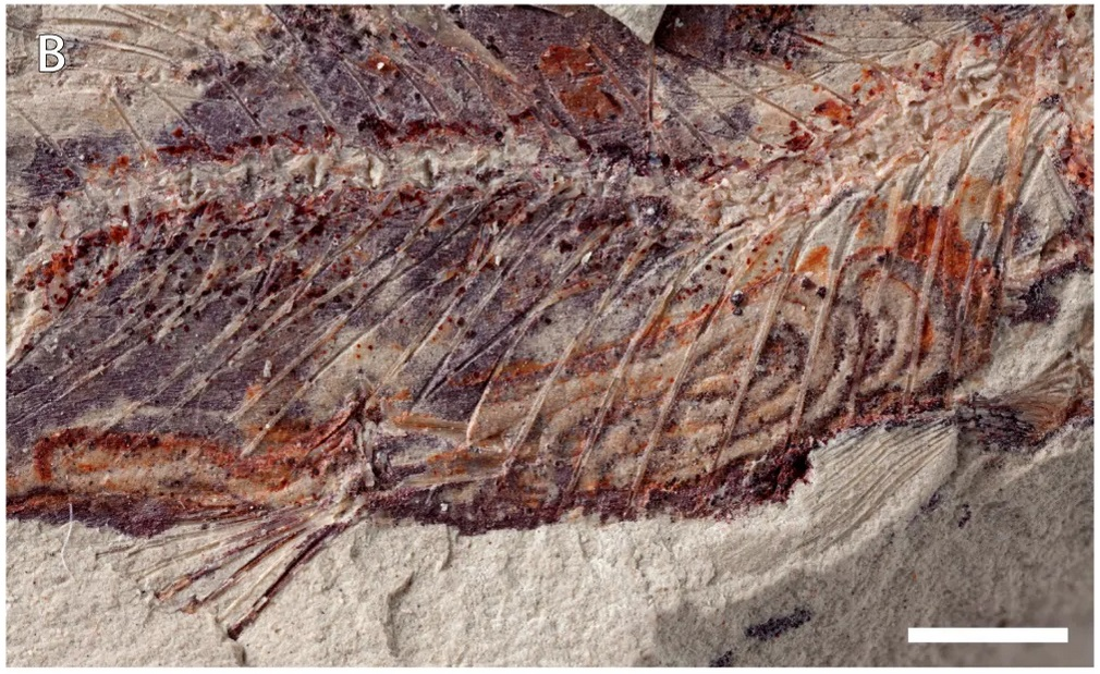 Exceptional preservation of the intestine in a specimen of the early spiny-rayed fish Spinocaudichthys. (B) Close-up of the abdominal region. Scale bar 2 mm